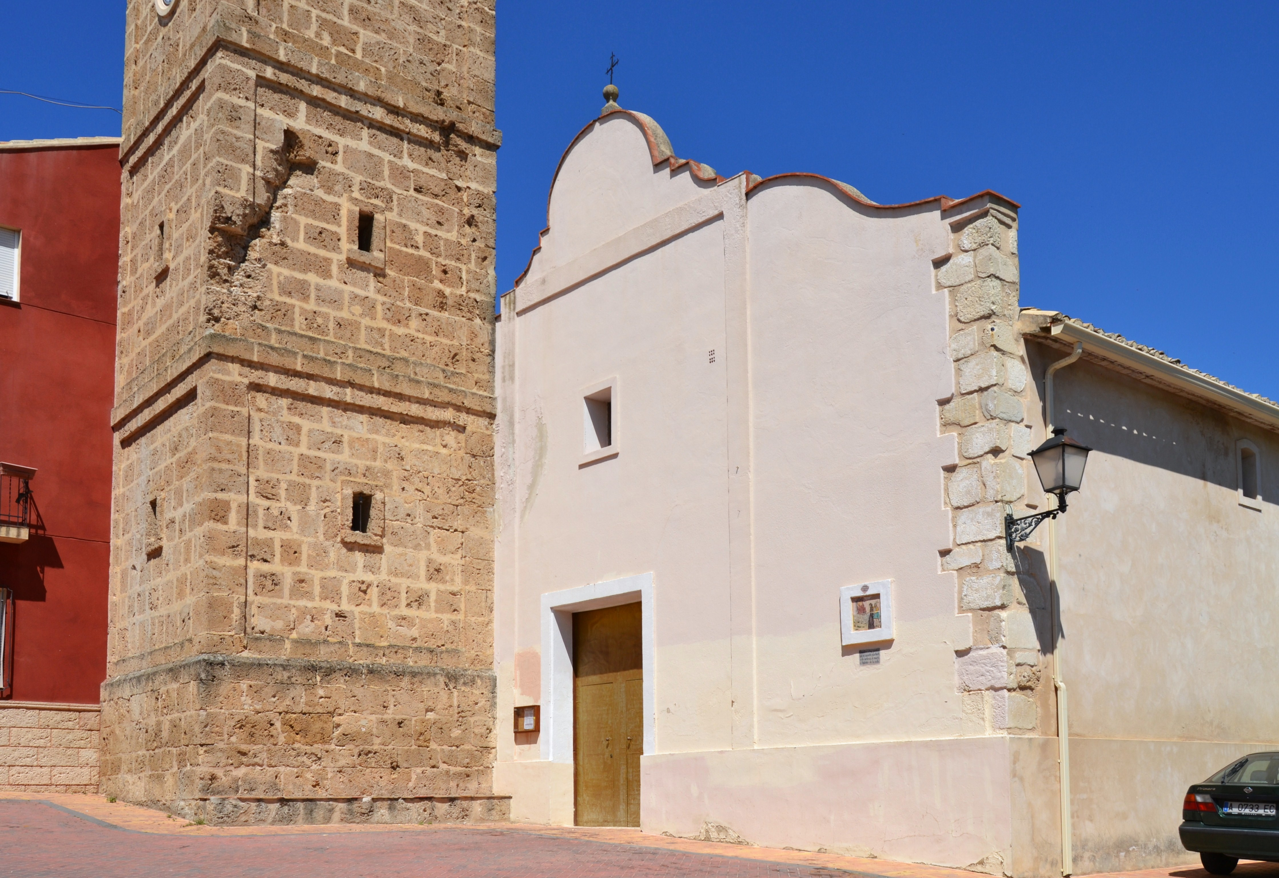 Alcosser de Planes. església de sant Josep.